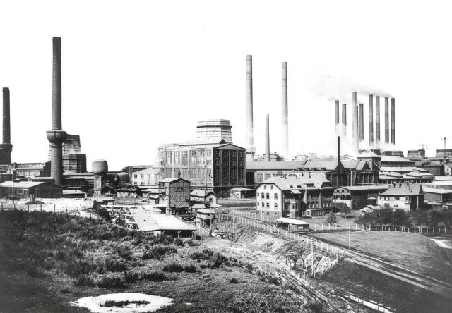 Aktien-Gesellschaft für Stickstoffdünger in Knapsack - heute Chemiepark Knapsack, Huerth, Germany